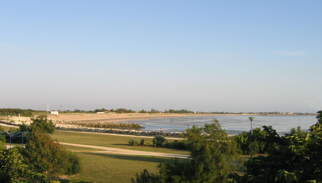 La plage d'Aytré près de La Rochelle, France